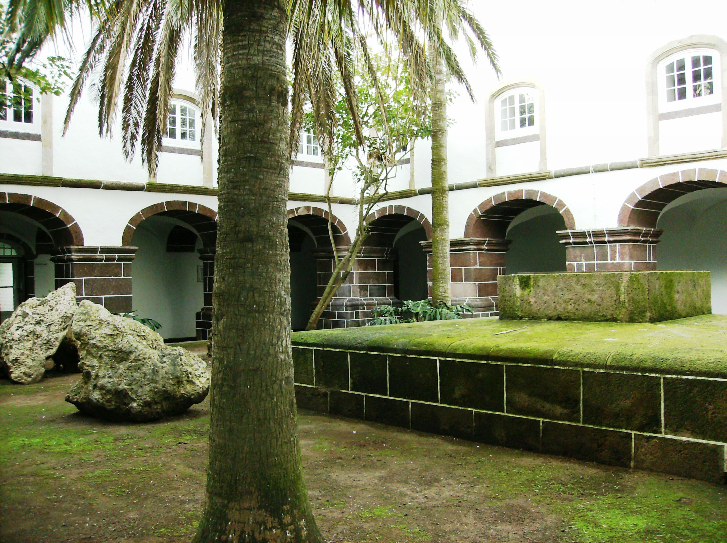 Convento de São Francisco de Vila do Porto, Ilha de Santa Maria (Açores), Portugal